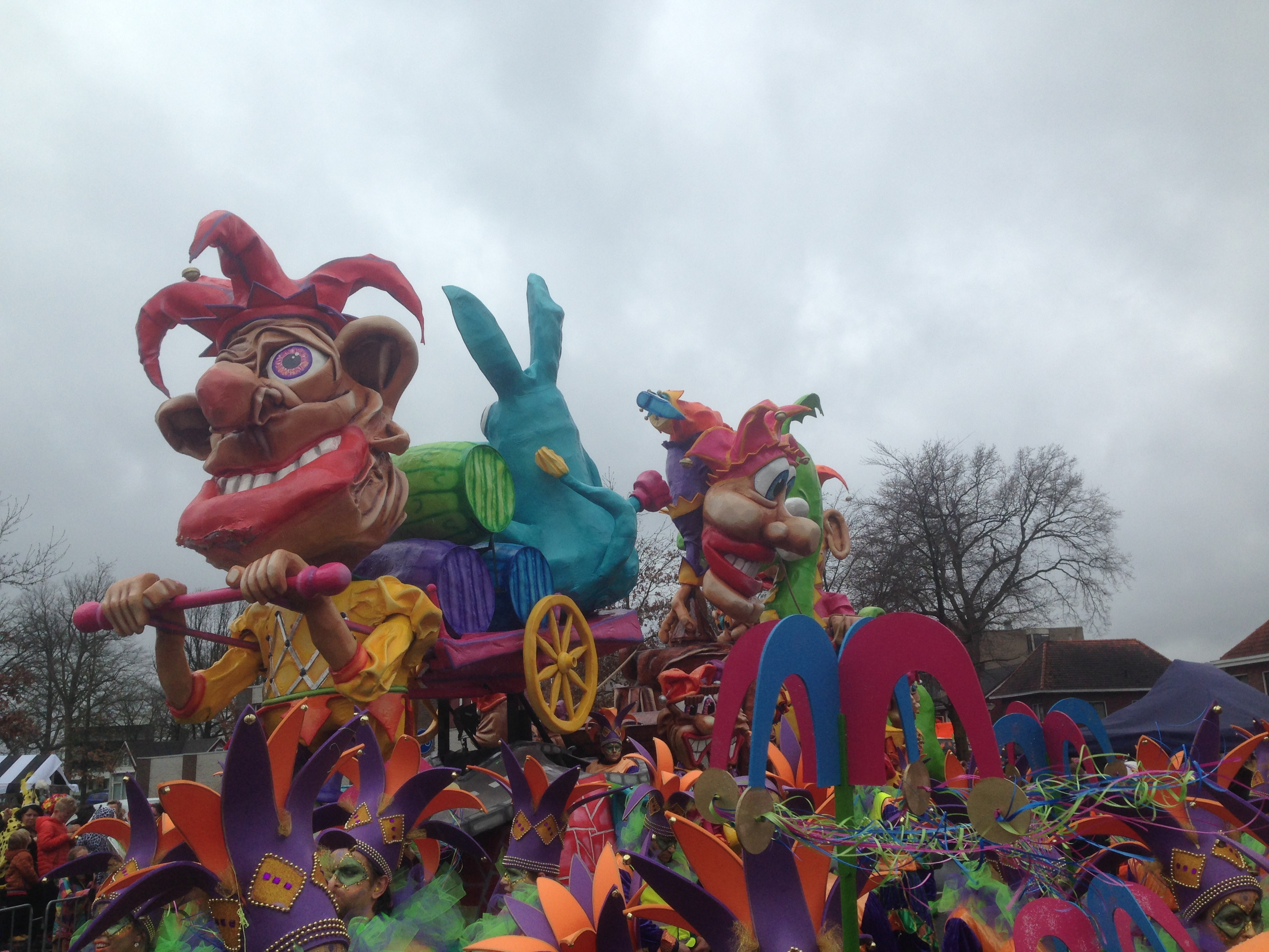 Carnival in Boeskoolstad, nickname of Oldenzaal, Overijssel, Netherlands